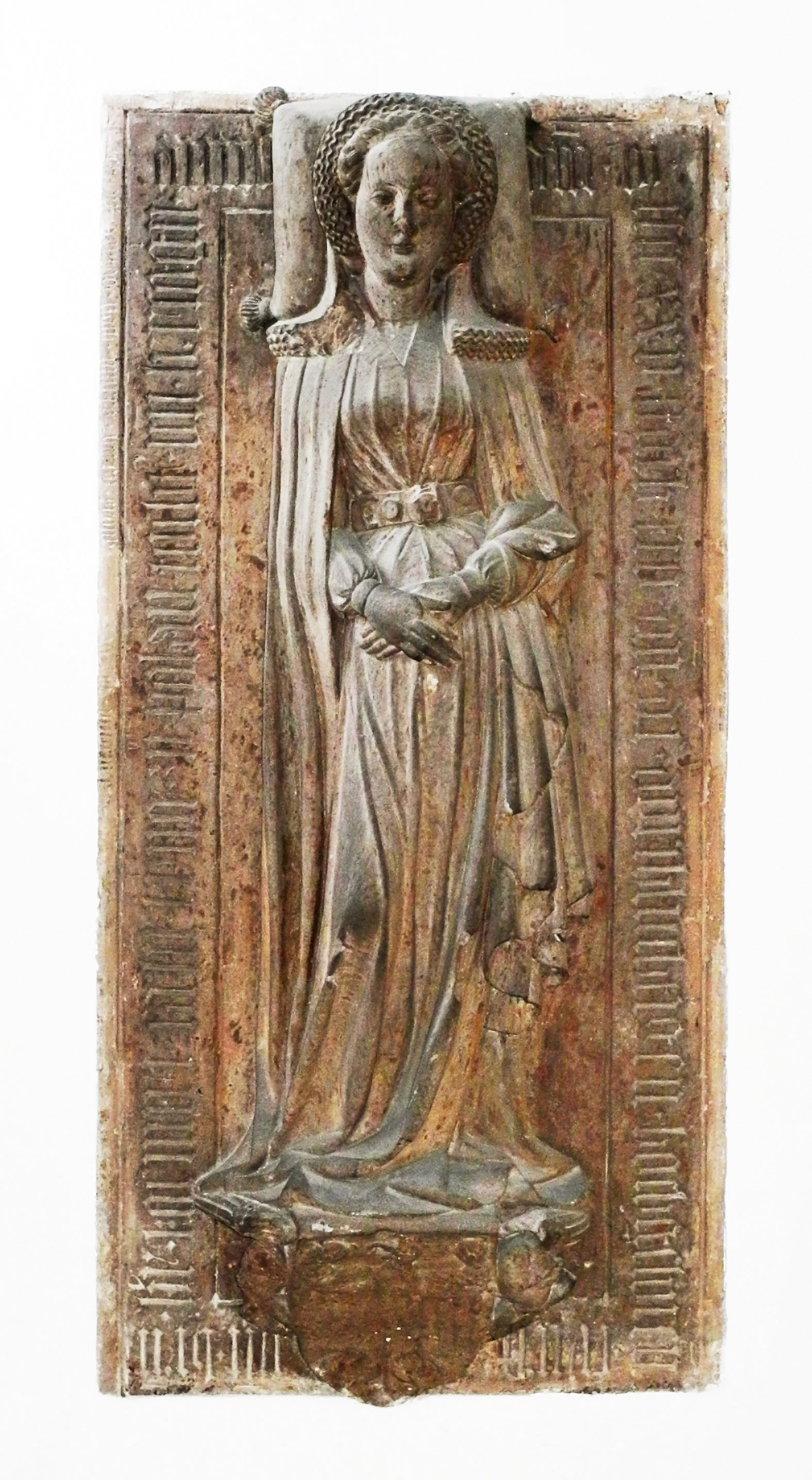 Stadtpfarrkirche St. Stephan in Mindelheim; Sandsteinplatte als Grabdenkmal für Anna von Teck, Tochter König Kasimir III. von Polen, erste Gemahlin Herzog Ulrichs von Teck, +1425. Das Denkmal stand bis 1816 in der abgebrochenen Stephanskirche vor der Stadt.